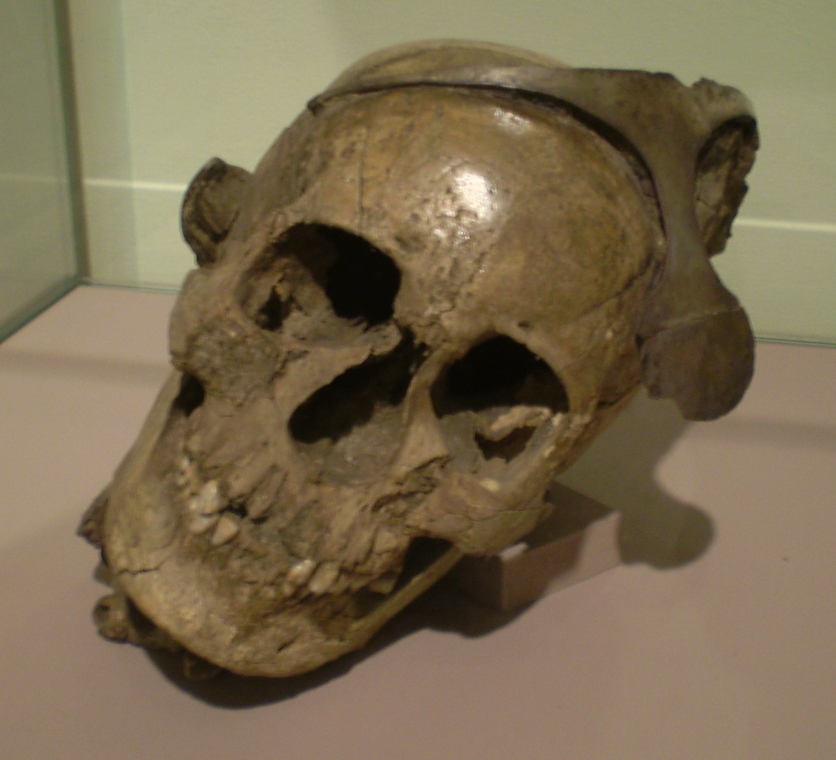 Restos de un cráneo con diadema de plata de la cultura de El Argar, Bronce Pleno en el sur de España, cráneo de la sepultura 62 « Las alhajas, consisten en una diadema de plata, pendientes de oreja, de cobre y de plata, y collar, de hueso y de serpentina. » (Luis Siret)